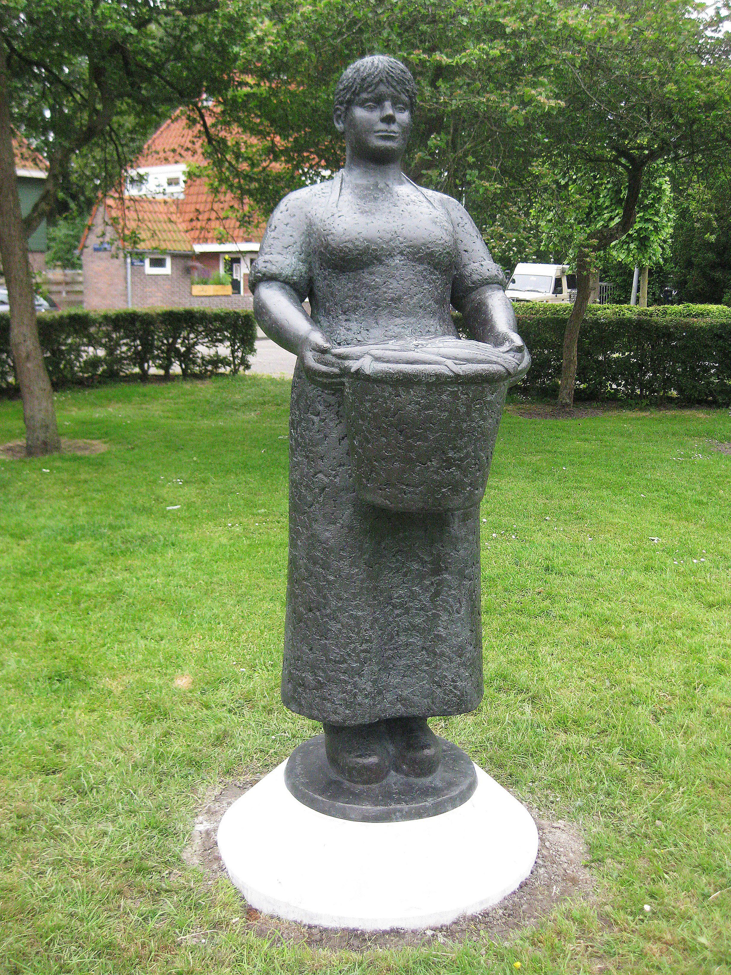 "Visvrouw" van Karin Beek. Brons, onthuld op 13 juni 2015 op het Purmerweg in Amsterdam-Noord (Nieuwendam)